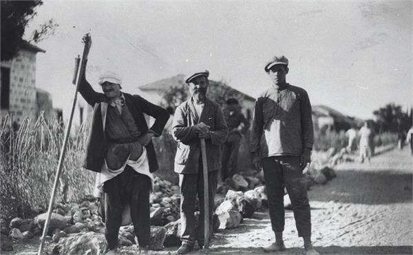 כפר תבור - אנשים מהמושבה.